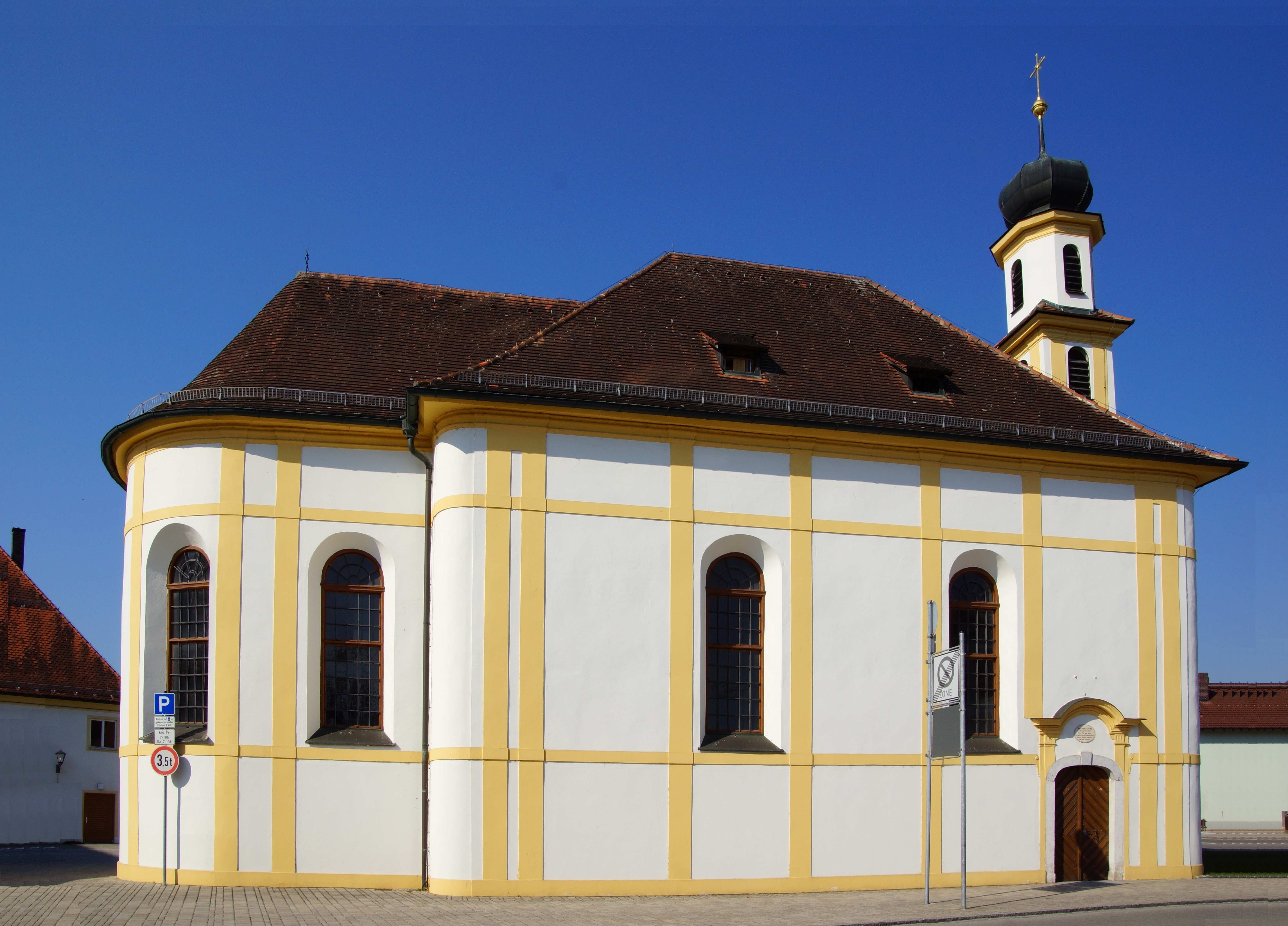 Die katholische Filialkirche "Zu unserer Lieben Frau" in Beilngries